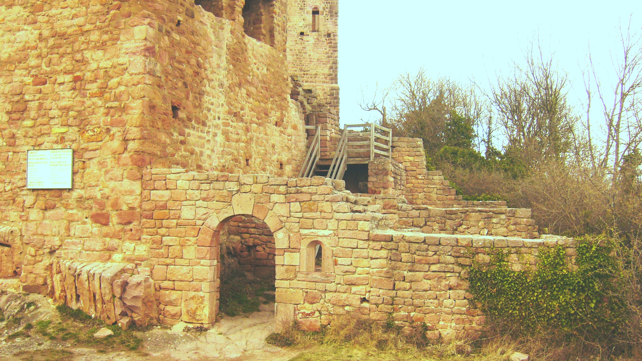 Porte de la partie haute du Wahlenbourg avant d'accéder au logis seigneurial